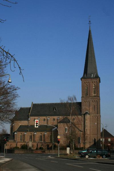 Kath. Pfarrkirche in Wegberg-Arsbeck